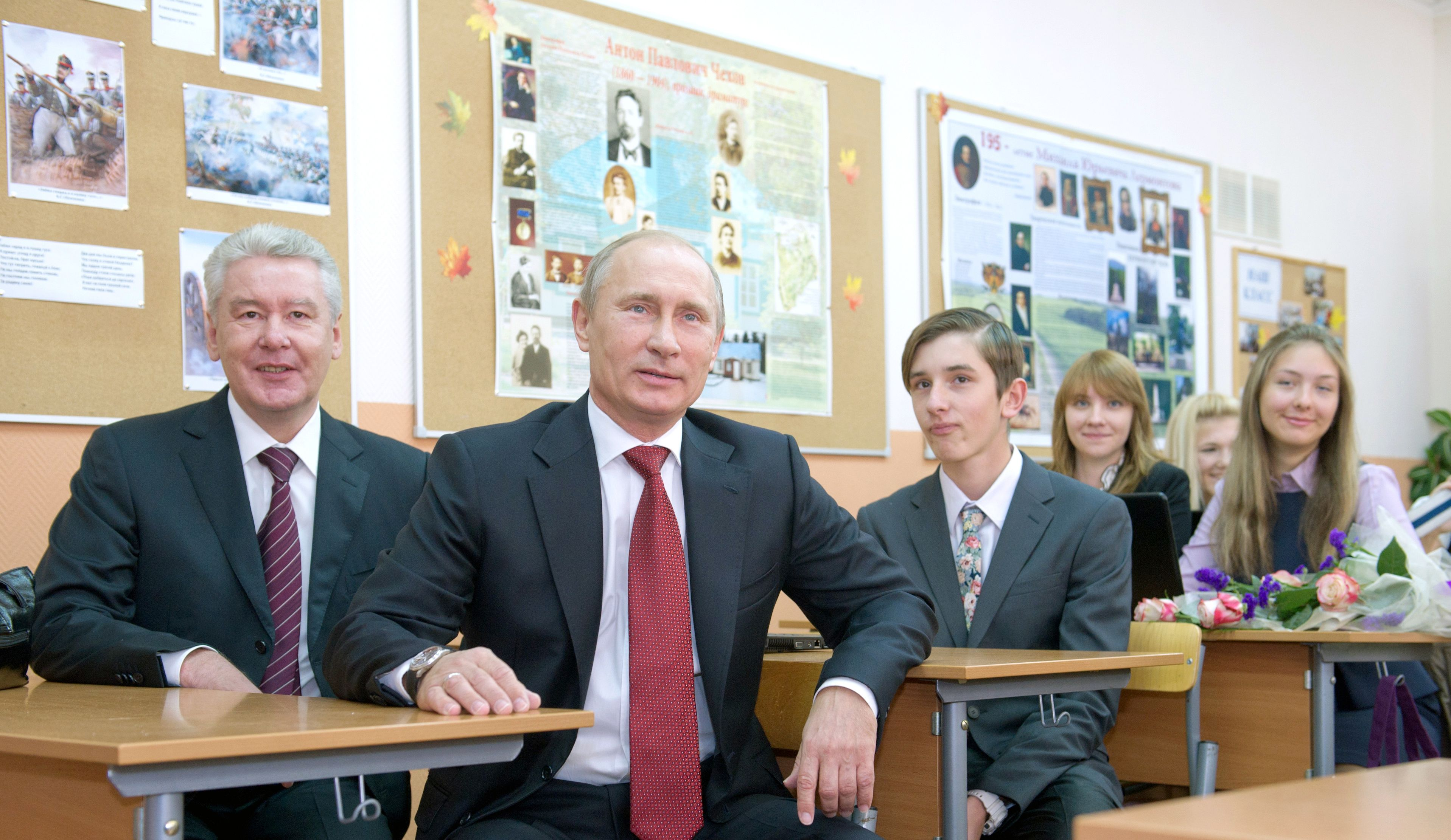 Владимир Путин и Сергей Собянин на уроке в гимназии № 1519.